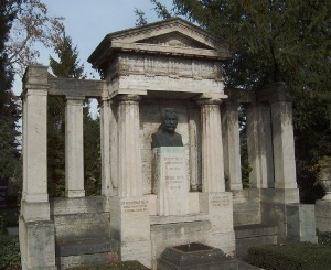 Ehrengrab von Otto Beck auf dem Hauptfriedhof in Mannheim.